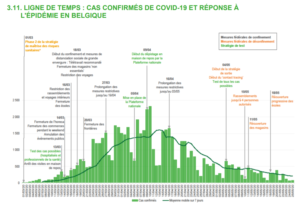 LIGNE DE TEMPS : CAS CONFIRMÉS DE COVID-19 ET RÉPONSE À L'ÉPIDÉMIE EN BELGIQUE